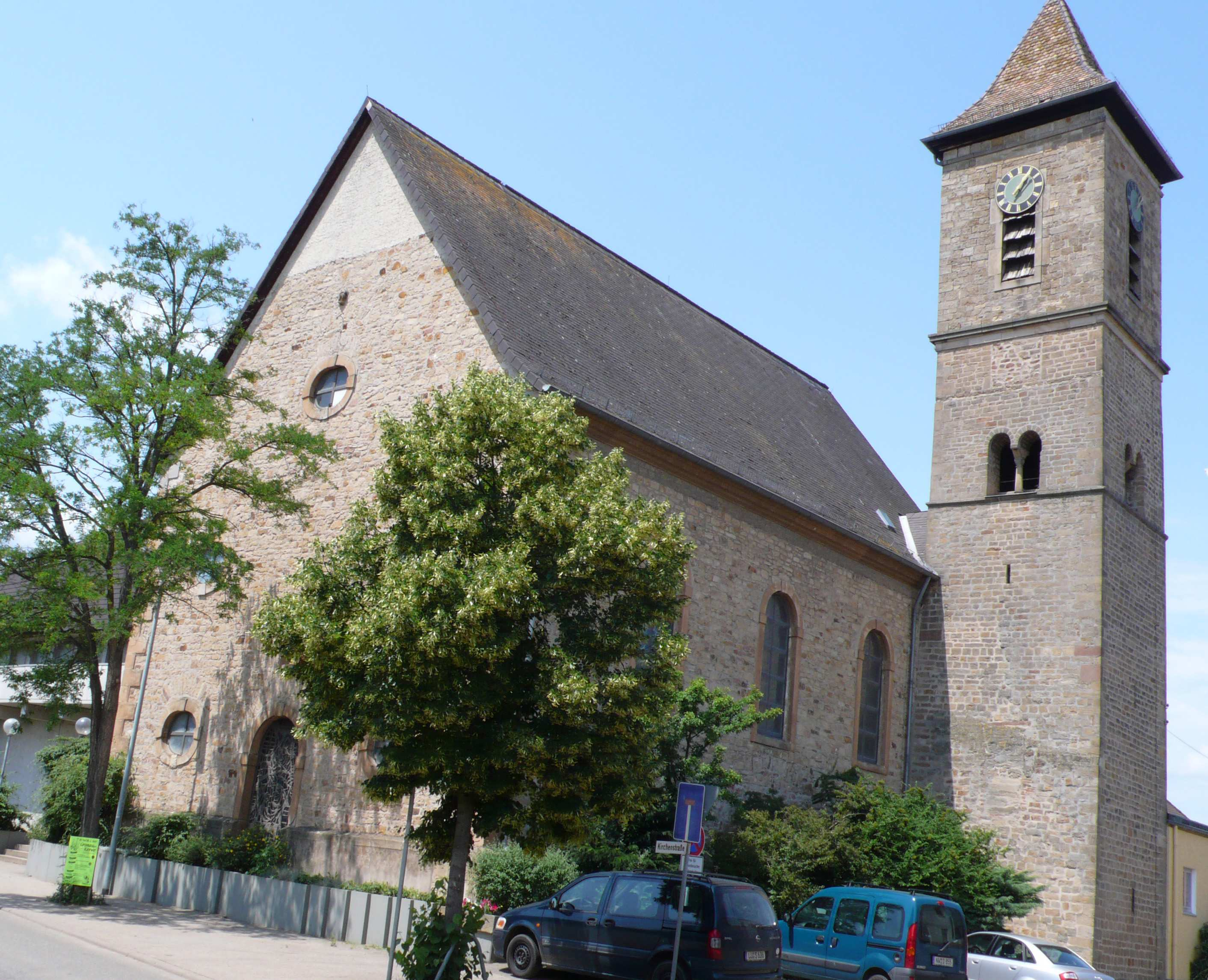 Katholische Kirche Hochdorf, Germany